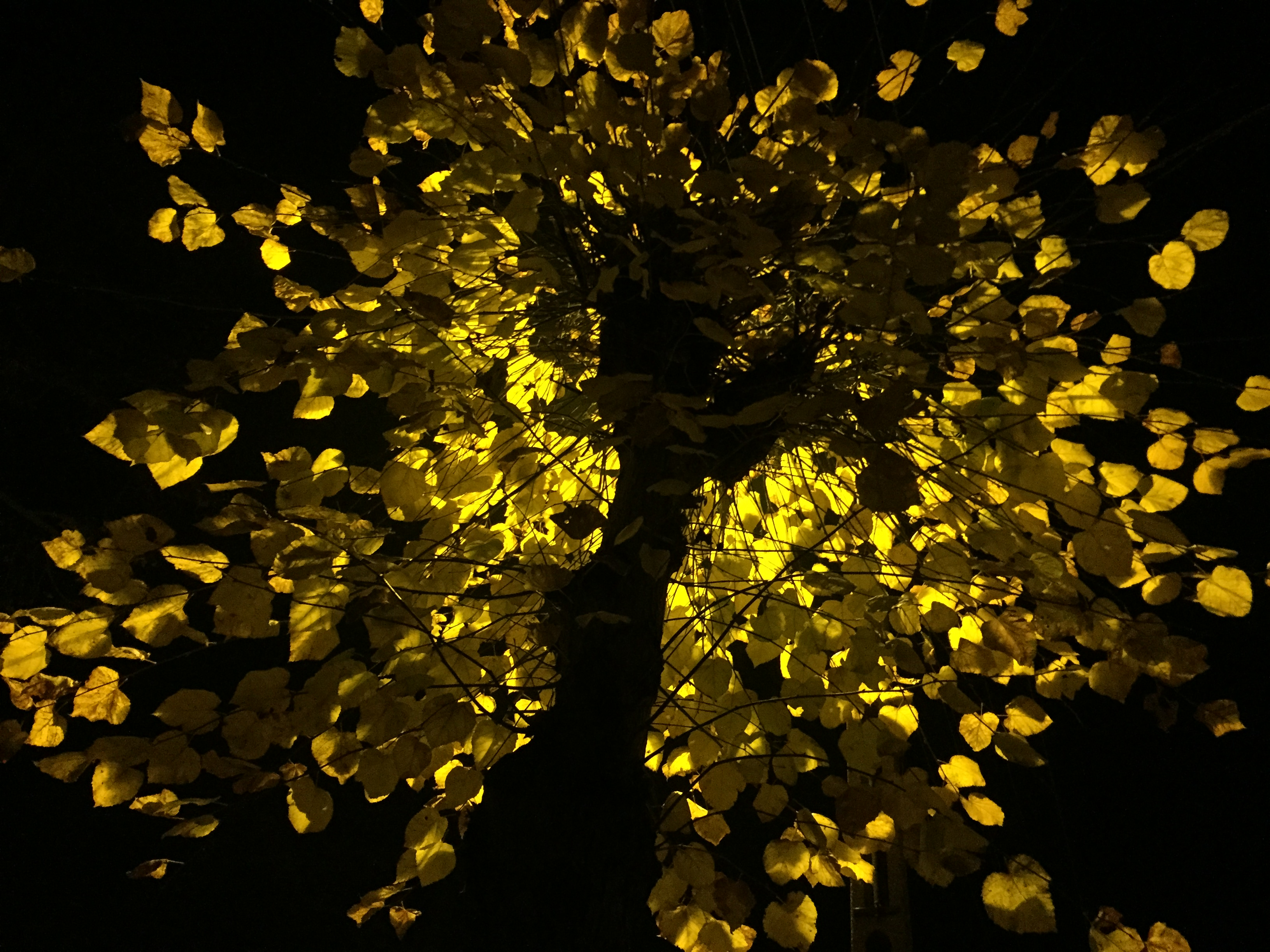 Podświetlona przez uliczną latarnię lipa z przebarwionymi liśćmi w Zaniemyślu.